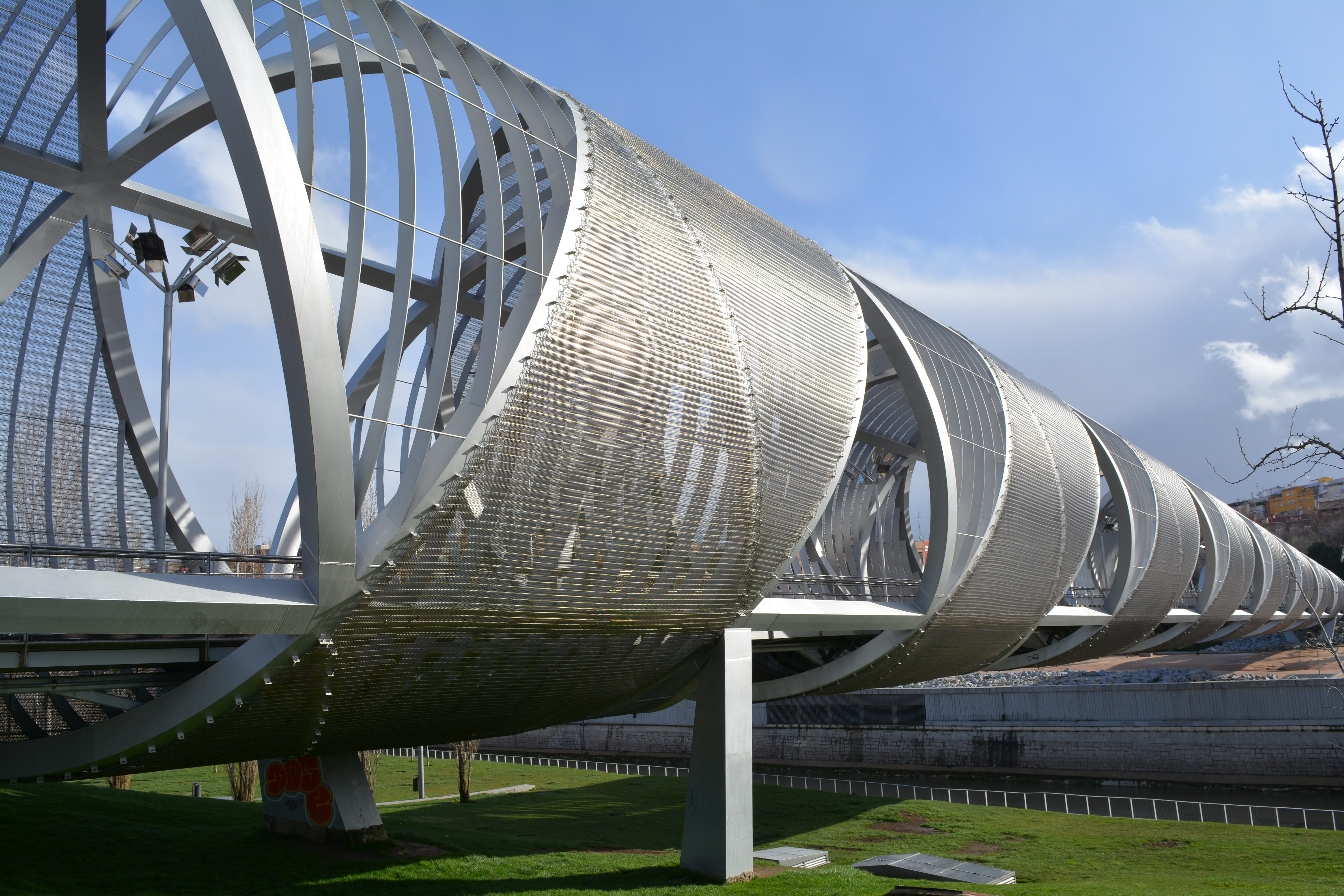 Detalle exterior pilas cimentación